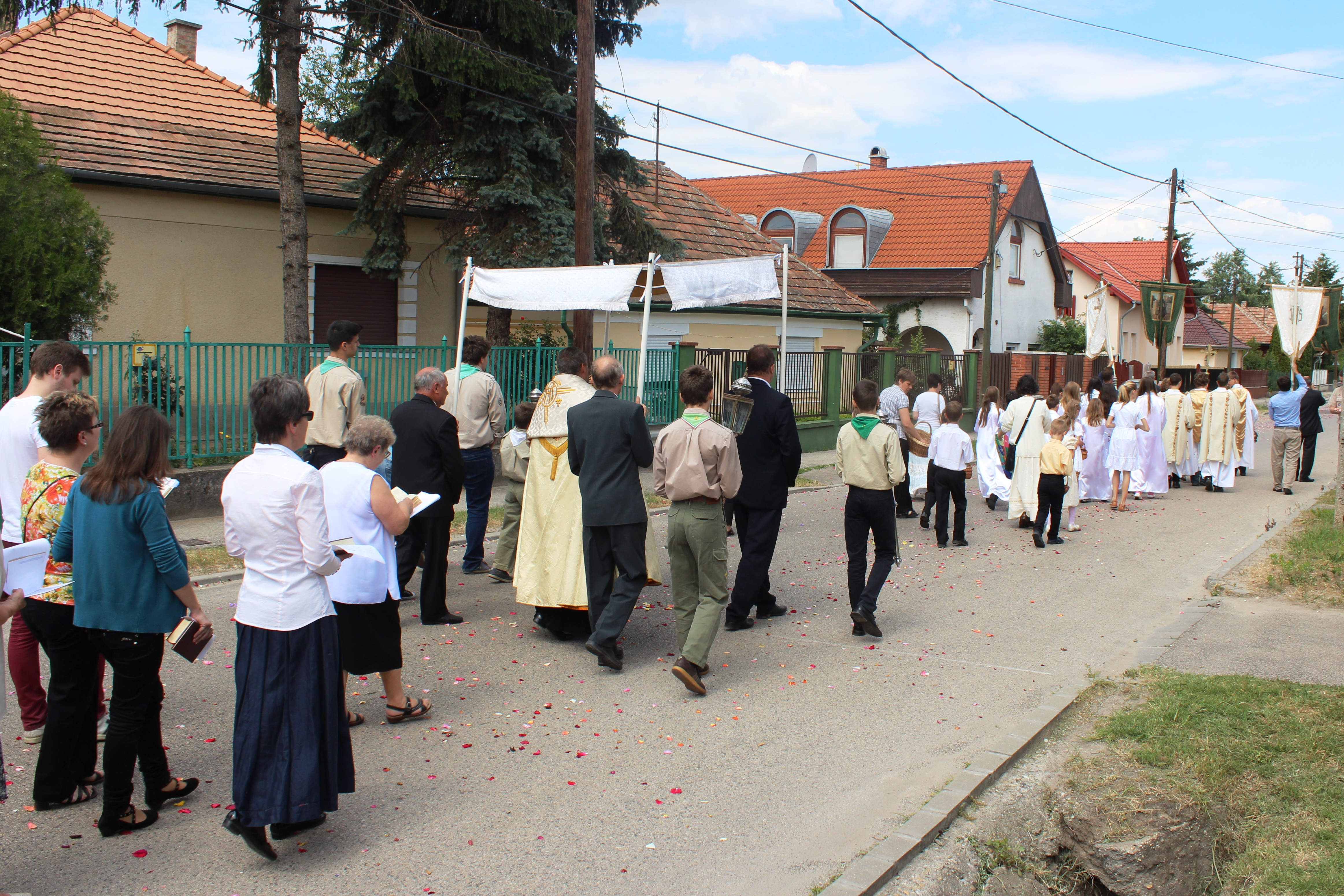 Körmenet Úrnapján